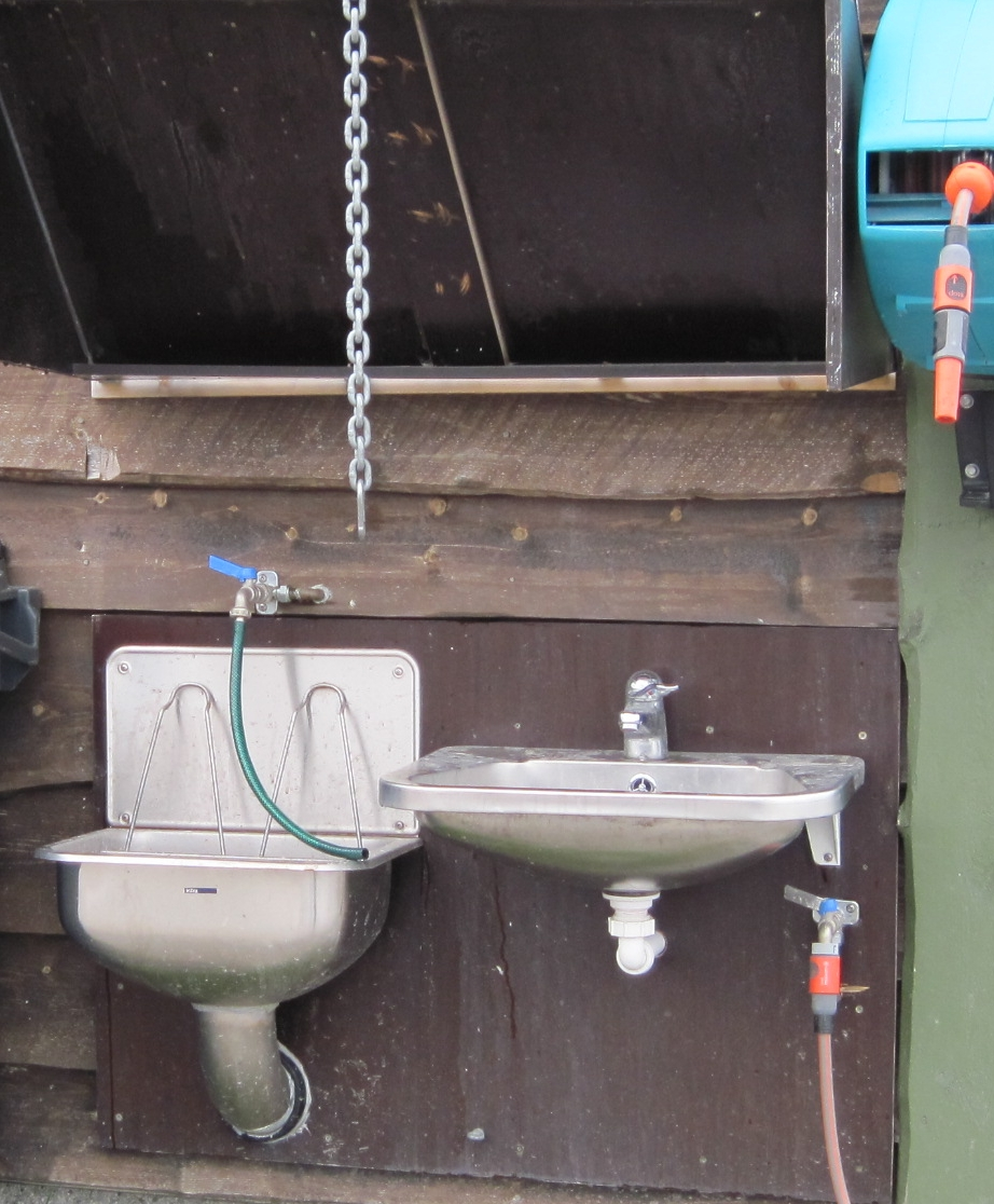 Kassettenenentleerung für Toiletten von Freizeitfahrzeugen